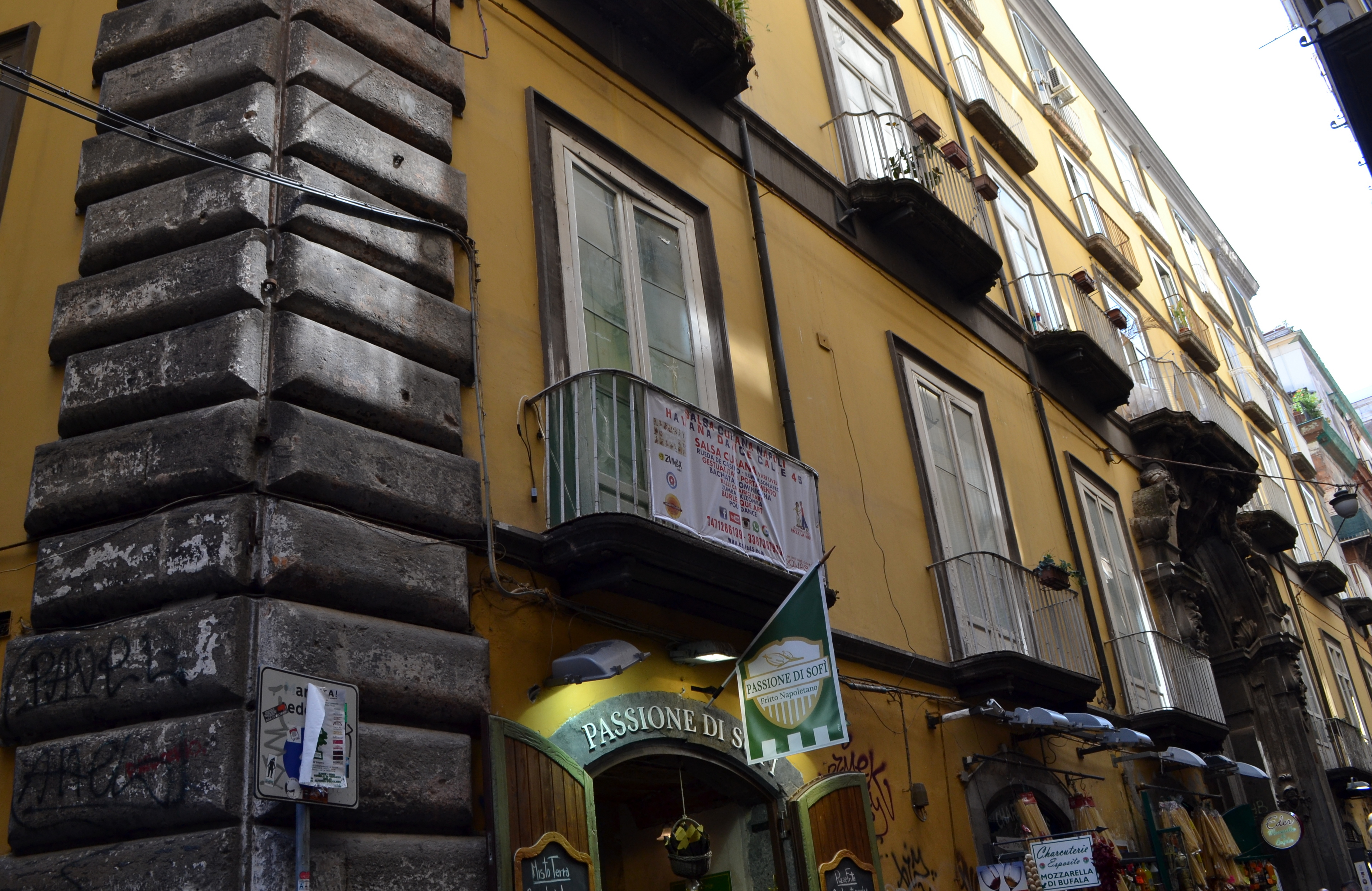 Facciata del palazzo Carafa della Spina (Napoli)